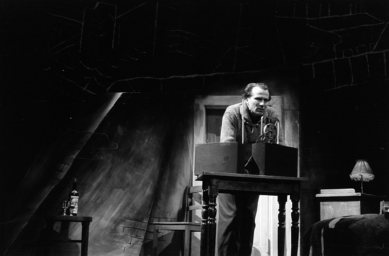 Original image description from the Deutsche FotothekSzenenbilder